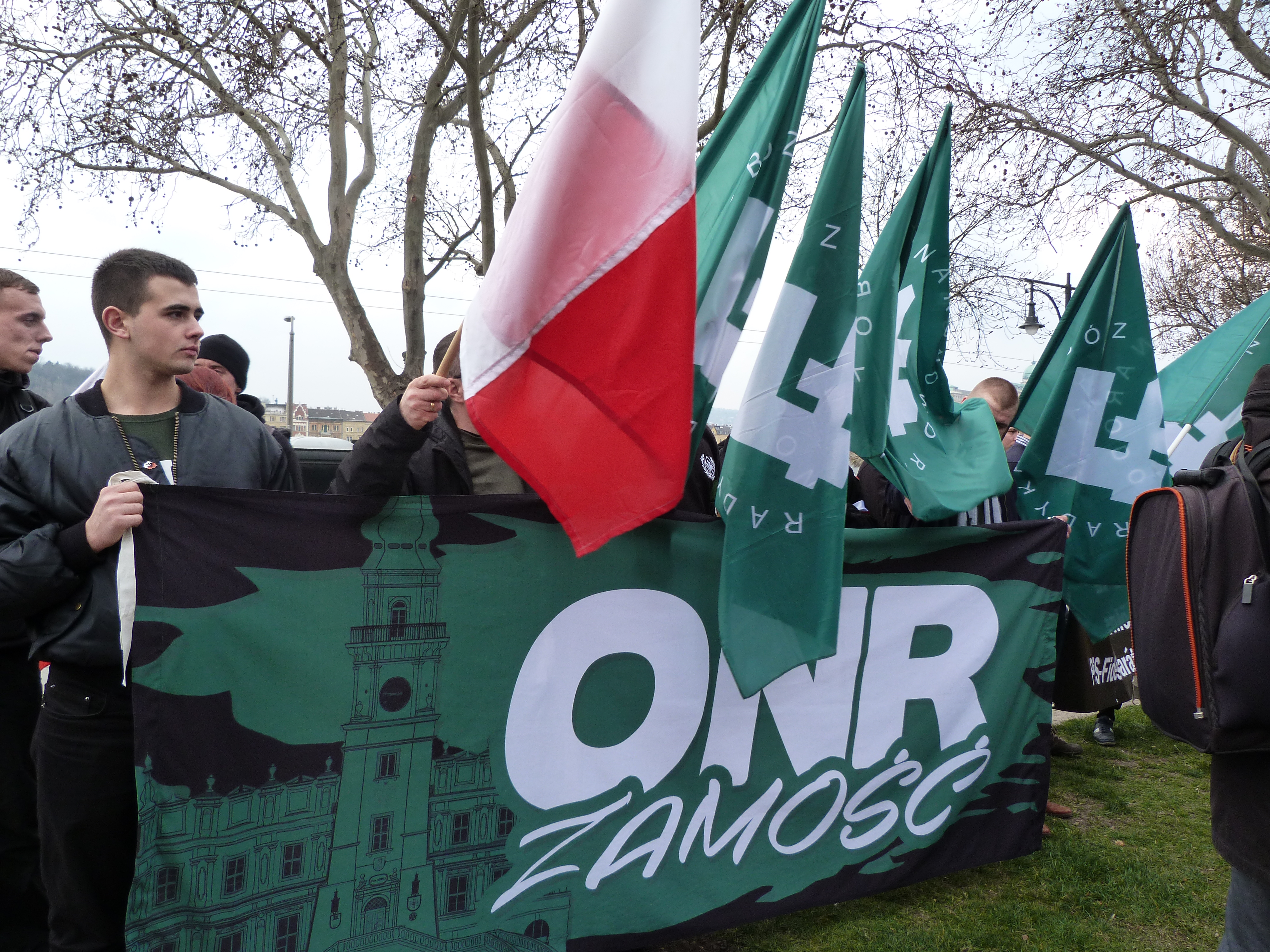 A felvétel 2015. március 15-én készült Budapesten, a Március 15-e téren. Obóz Narodowo-Radykalny. A Jobbik naggyűlése.